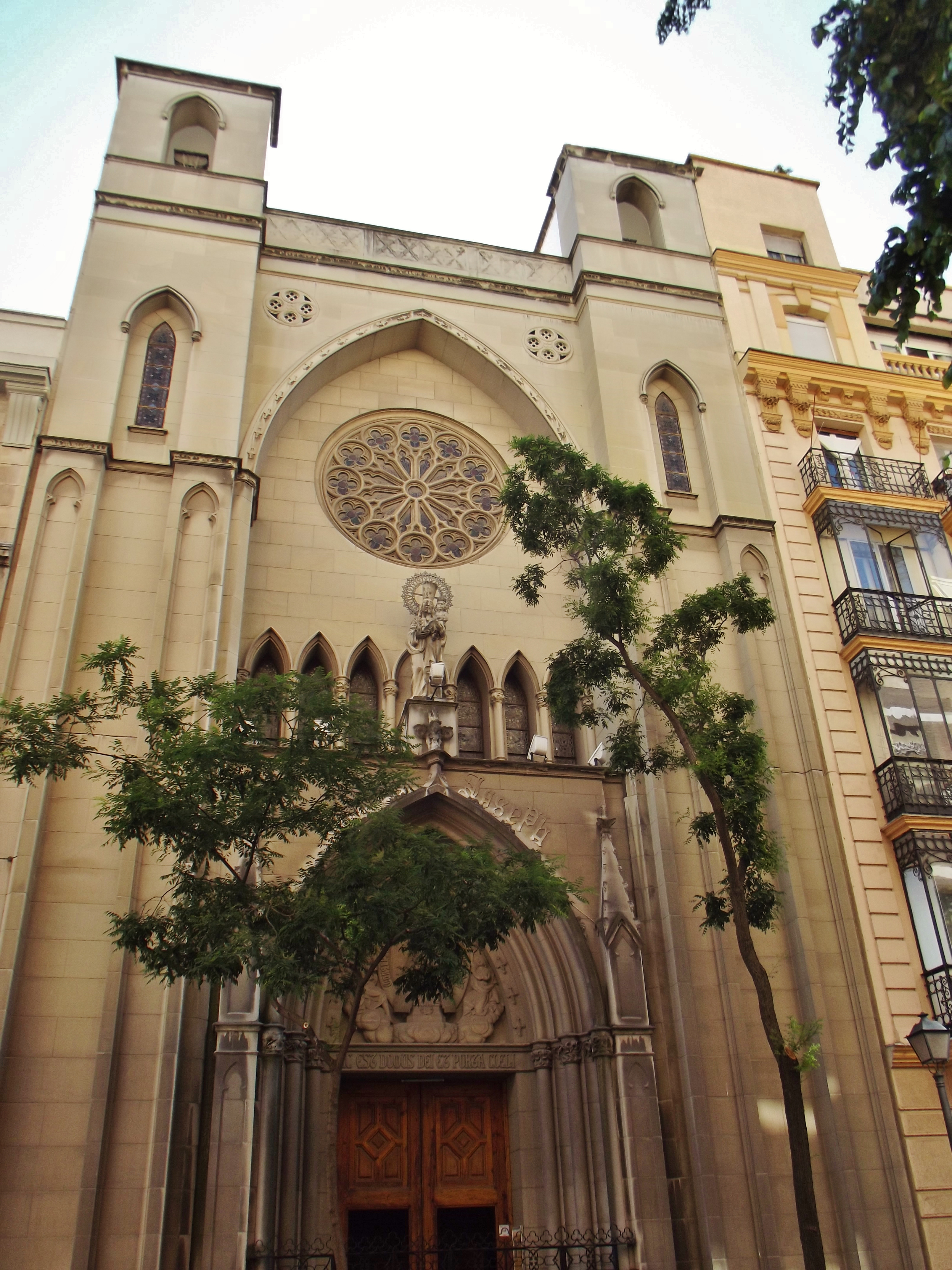 Iglesia de San José de la Montaña, Calle Fernández de la Hoz 16, 28010, Madrid.